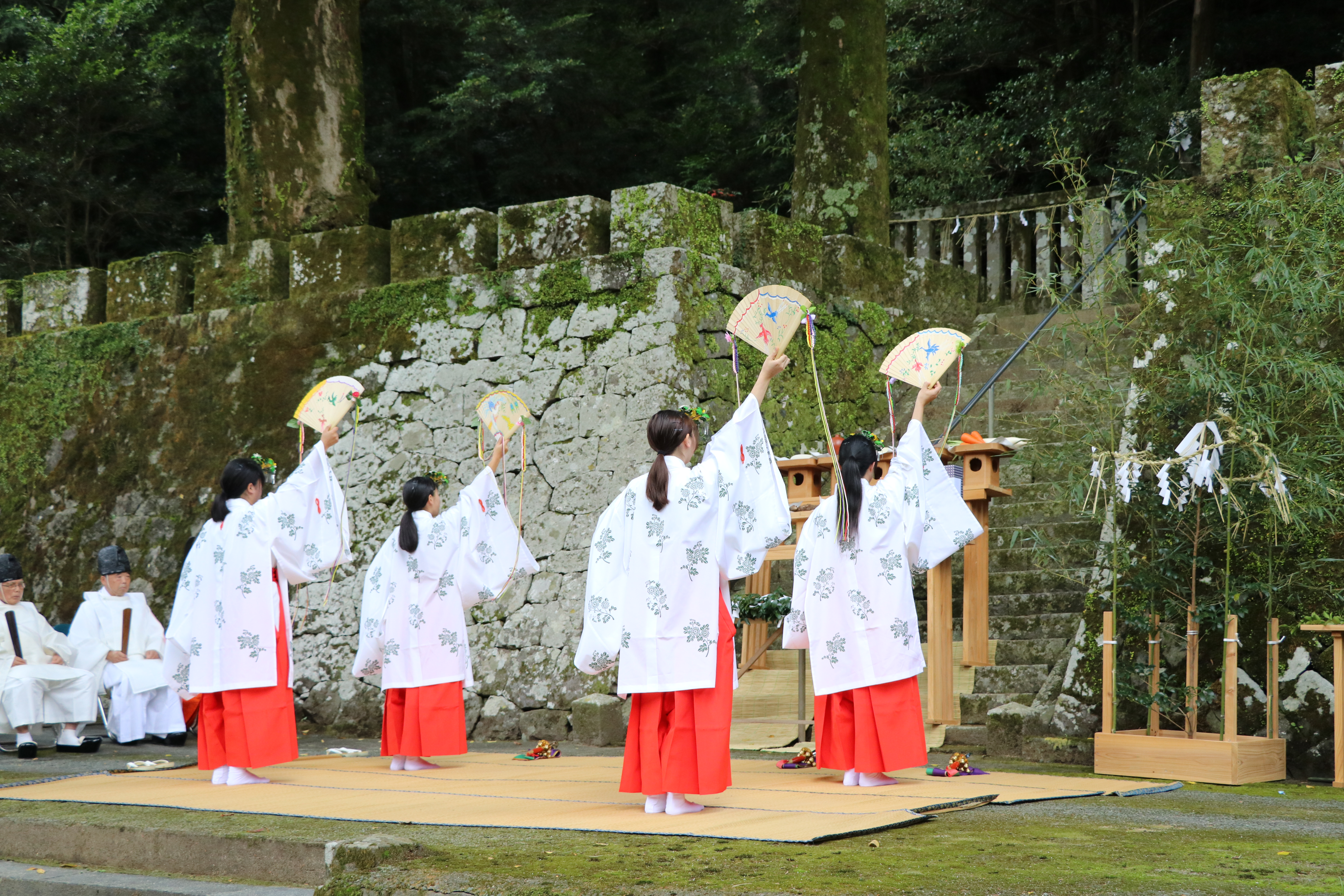 良成親王命日である10月8日に毎年開催される、八女市矢部村の大杣公園祭にて撮影（浦安の舞奉納の様子）